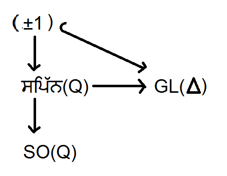 ਪੰਜਾਬੀ: ਸਪਿੱਨ ਪ੍ਰਸਤੁਤੀ Δ, ਸਪਿੱਨ ਗਰੁੱਪ ਦੀ ਇੱਕ ਪ੍ਰਸਤੁਤੀ ਵਾਲੀ ਇੱਕ ਵੈਕਟਰ ਸਪੇਸ ਹੁੰਦੀ ਹੈ ਜੋ (ਵਿਸ਼ੇਸ਼) ਔਰਥੋਗਨਲ ਗਰੁੱਪ ਦੀ ਕਿਸੇ ਪ੍ਰਸਤੁਤੀ ਰਾਹੀਂ ਹਿੱਸਿਆਂ ਵਿੱਚ ਨਹੀਂ ਟੁੱਟਦੀ